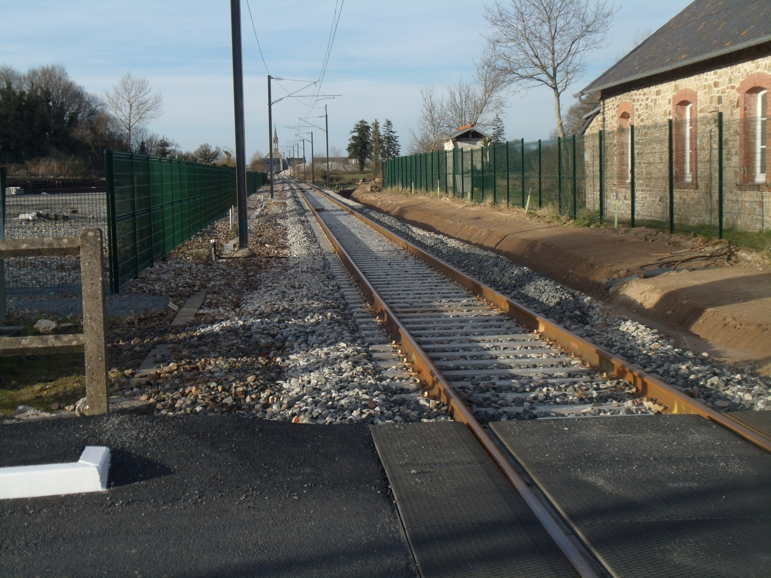 La voie de la ligne de Plouaret à Lannion au niveau de l'ancienne gare de Kerauzern en 2015